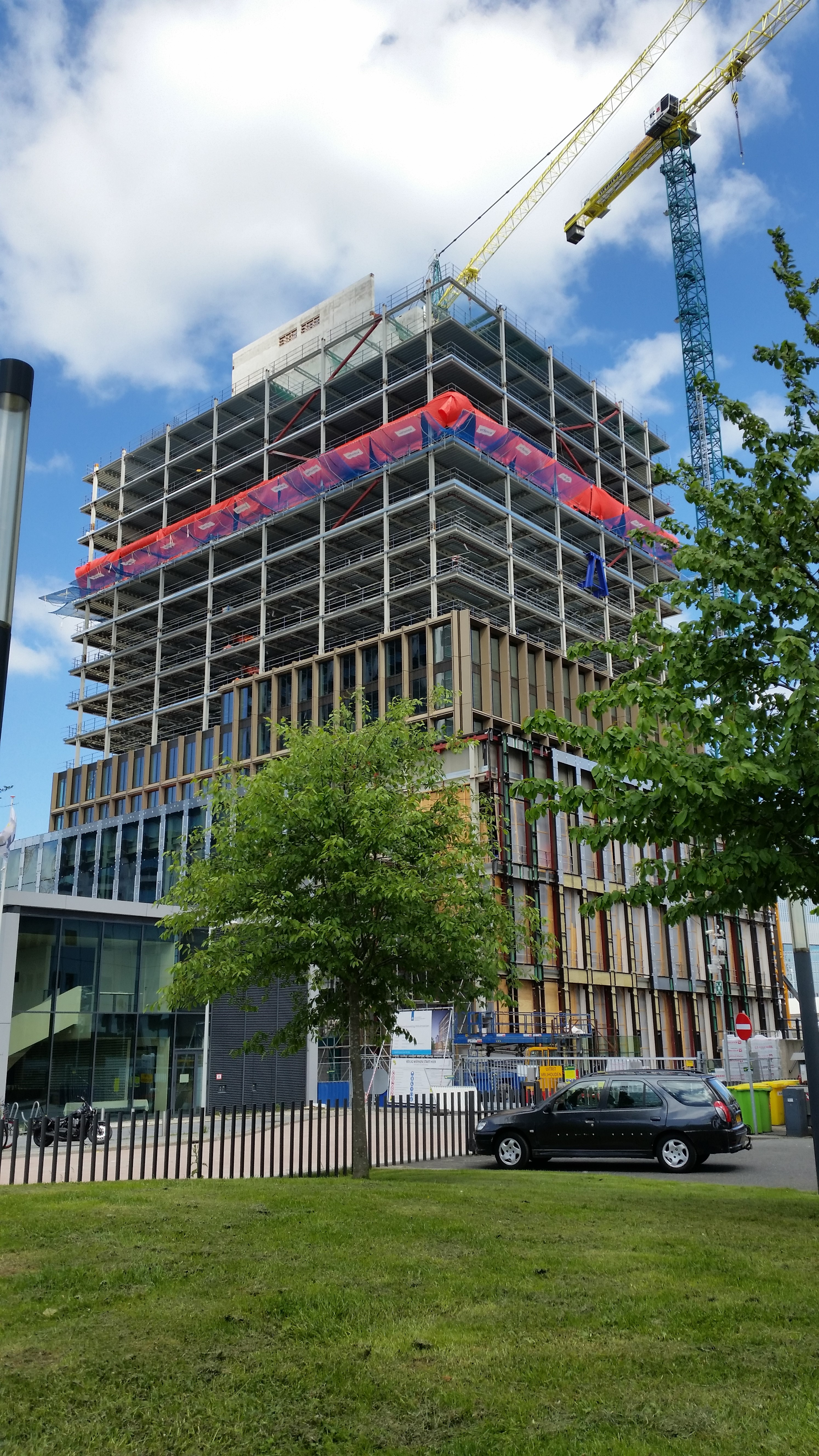 Vivaldigebouw in mei